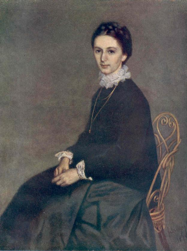 Ninon Szinyei Merse (1844–1877): sister of Pál Szinyei Merse